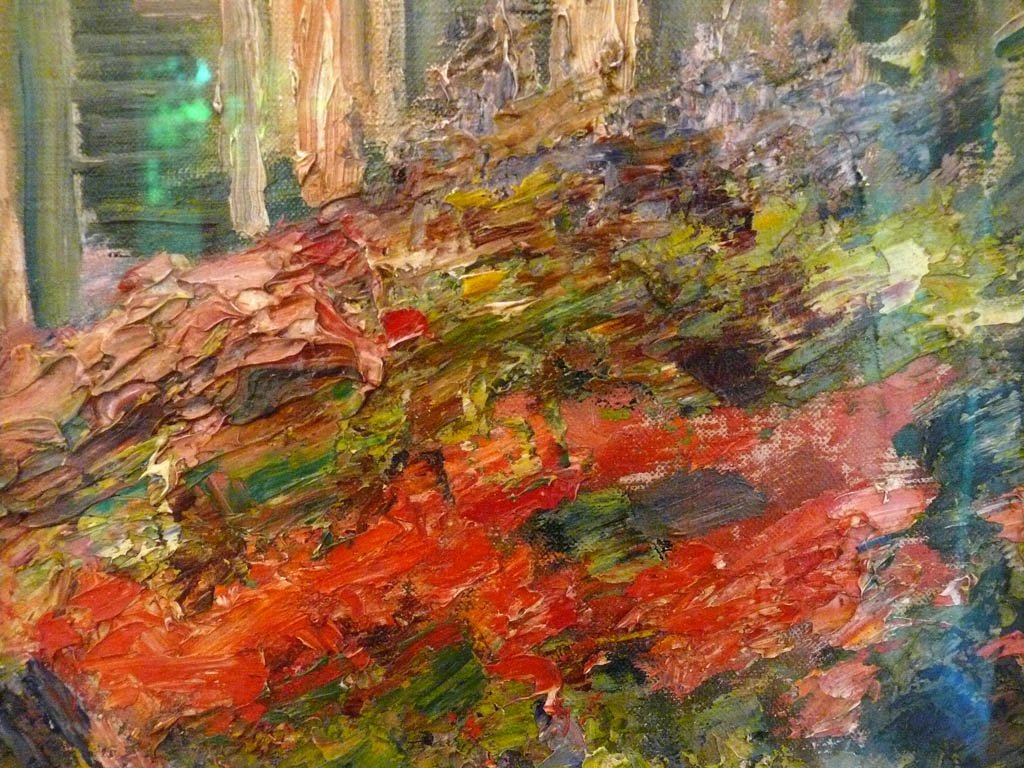 Gemälde von Max Liebermann - Detail